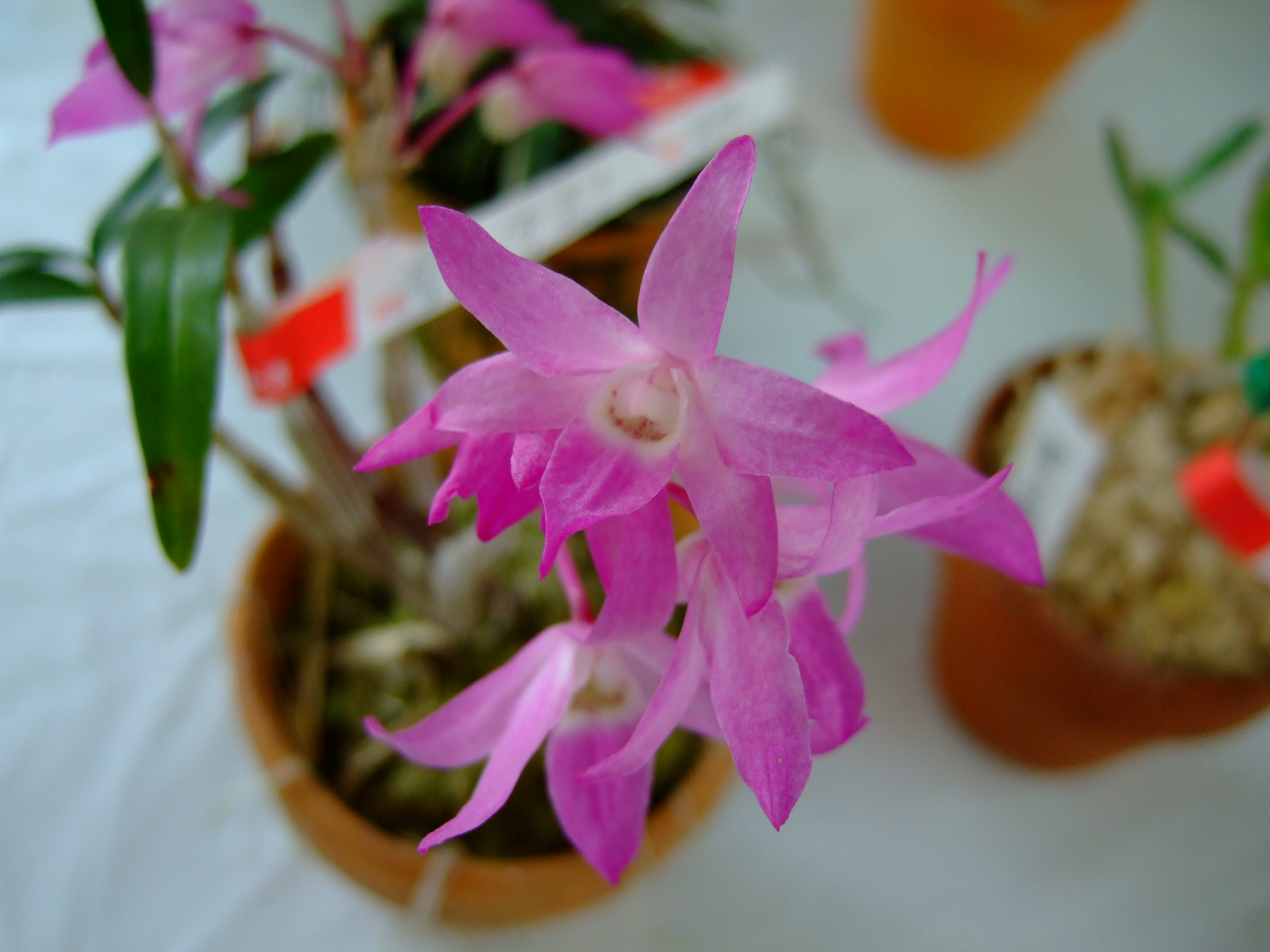 兵庫県立フラワーセンター セッコク 雷山(赤花)